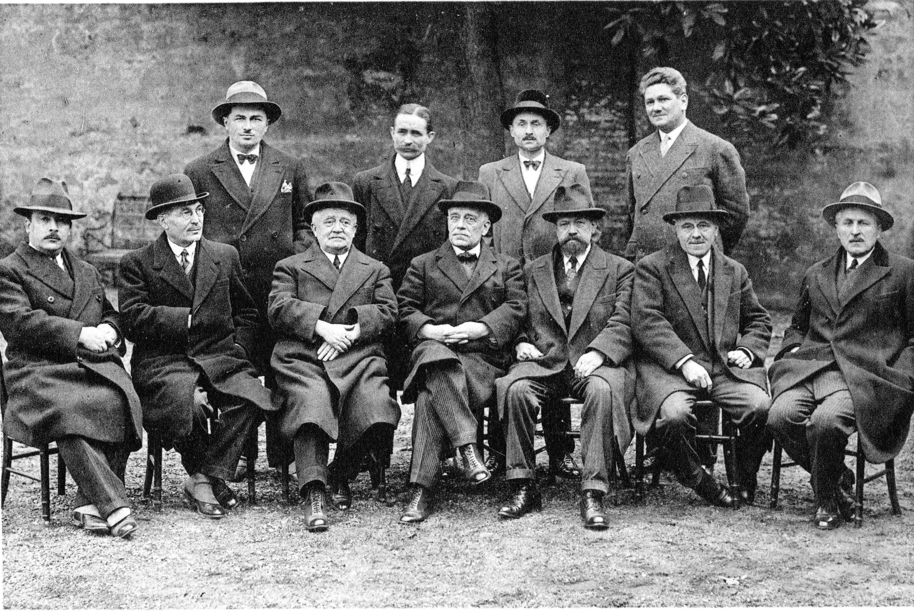 Le professeur Jean Sendrail (1872-1935), directeur de l'école vétérinaire de Toulouse et les autres professeurs de l'ENVT, en 1929 De gauche à droite et de bas en haut : Prof. DARRASPEN, Prof. CUILLÉ, Prof. GIRARD, Directeur Prof. SENDRAIL, Prof. LAFON, Prof. MARTIN, Prof. DAILLE En haut : Prof. CHELLE, Prof. LASSERRE, Prof. PETIT, Prof. PONS